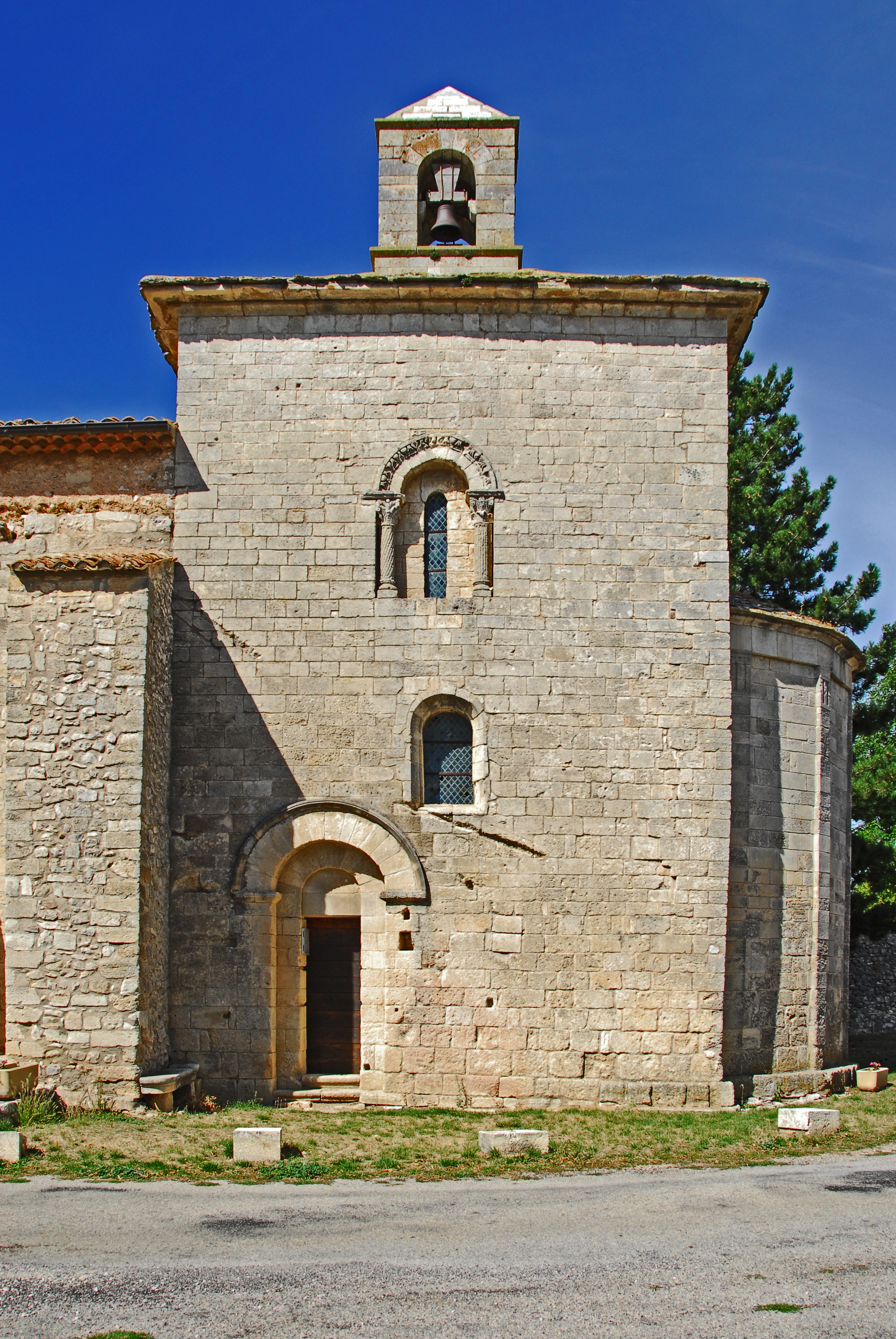 St-Trinit, Chorjoch, Südaseite